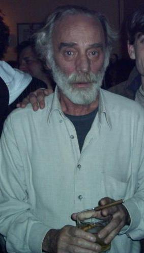 Javier Krahe tras dar un concierto en Granada (España) el 4 de marzo de 2005